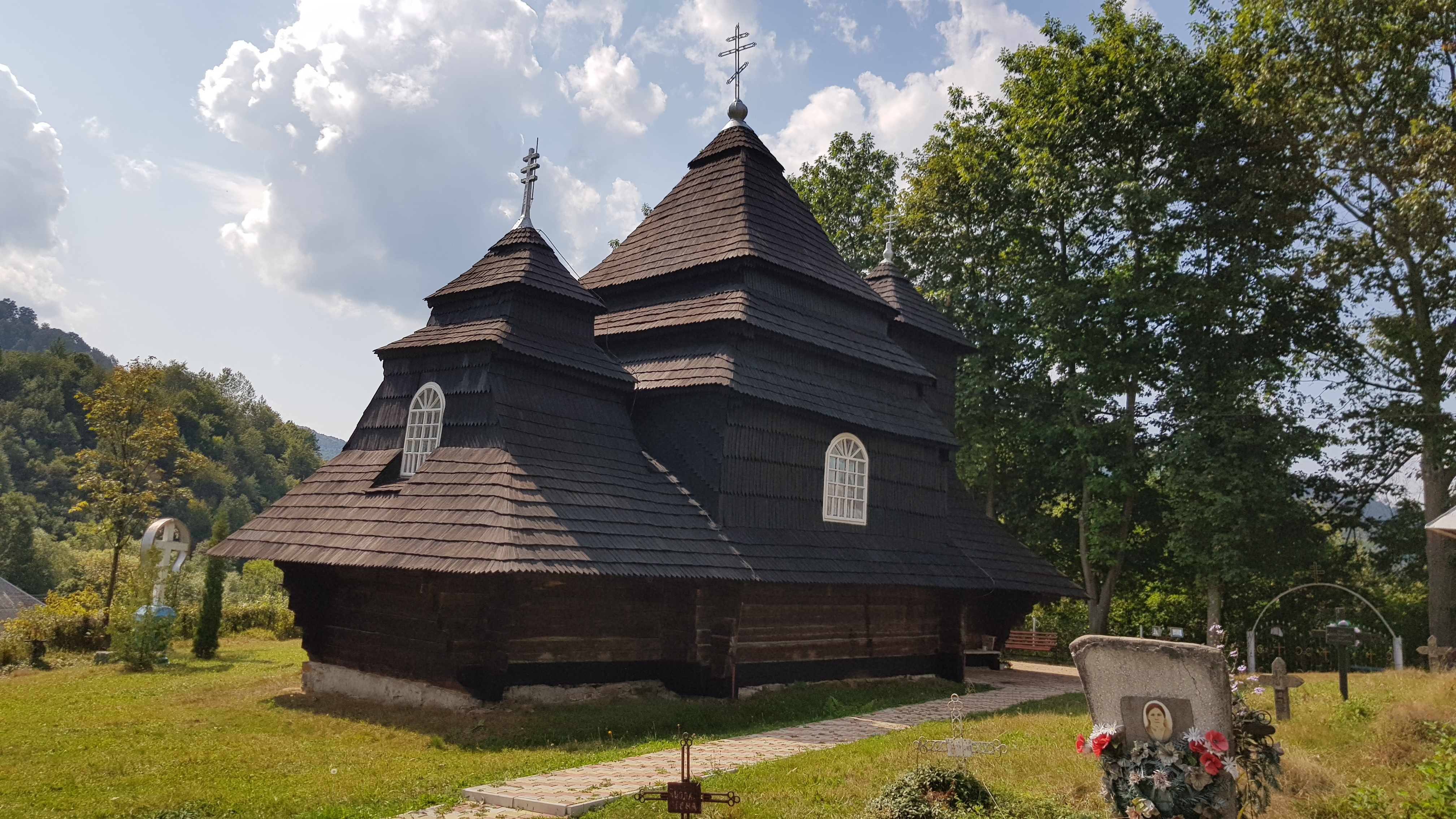 Михайлівська церква (дер.), Ужок